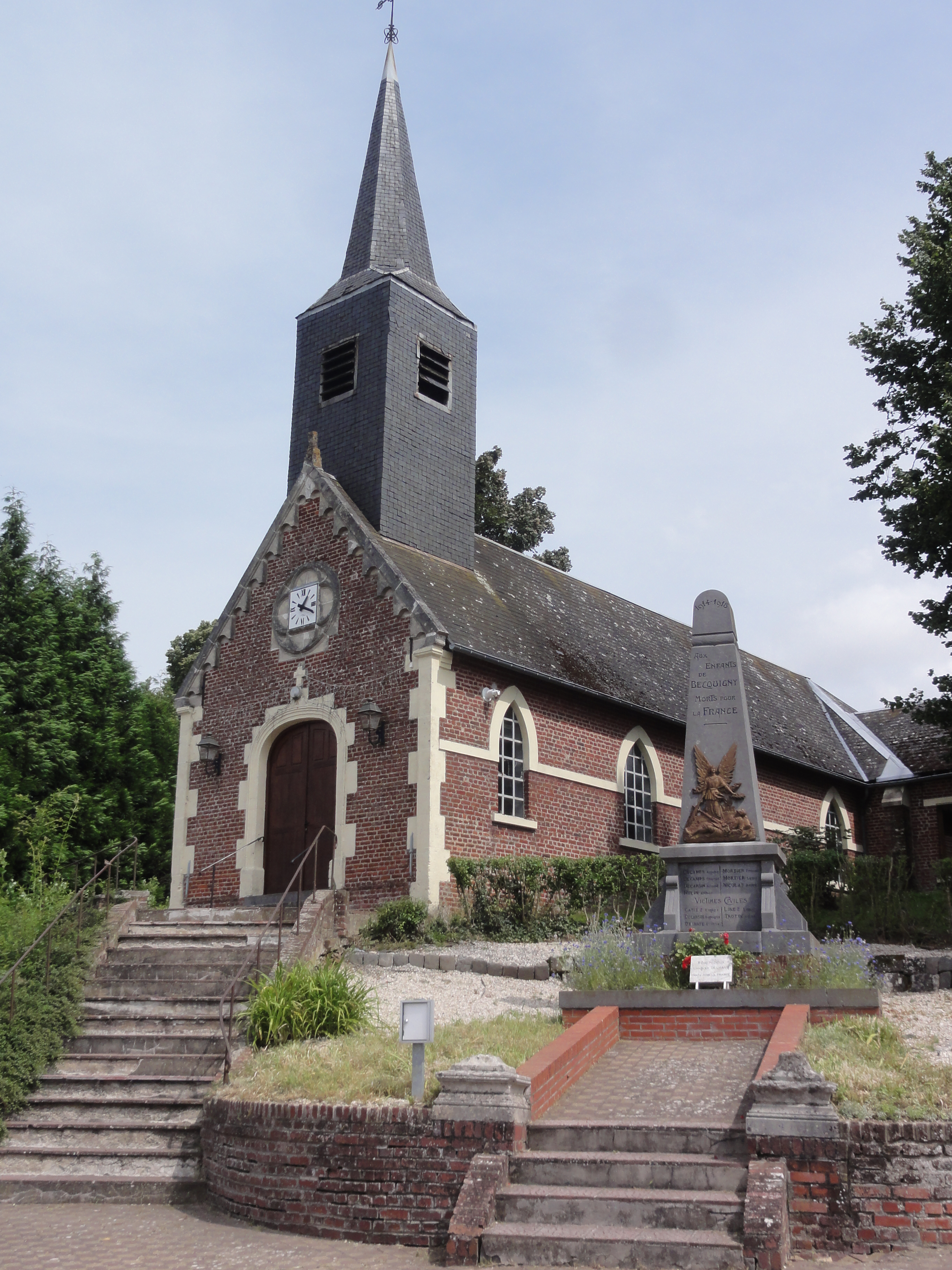 Becquigny (Aisne) église et monument aux morts